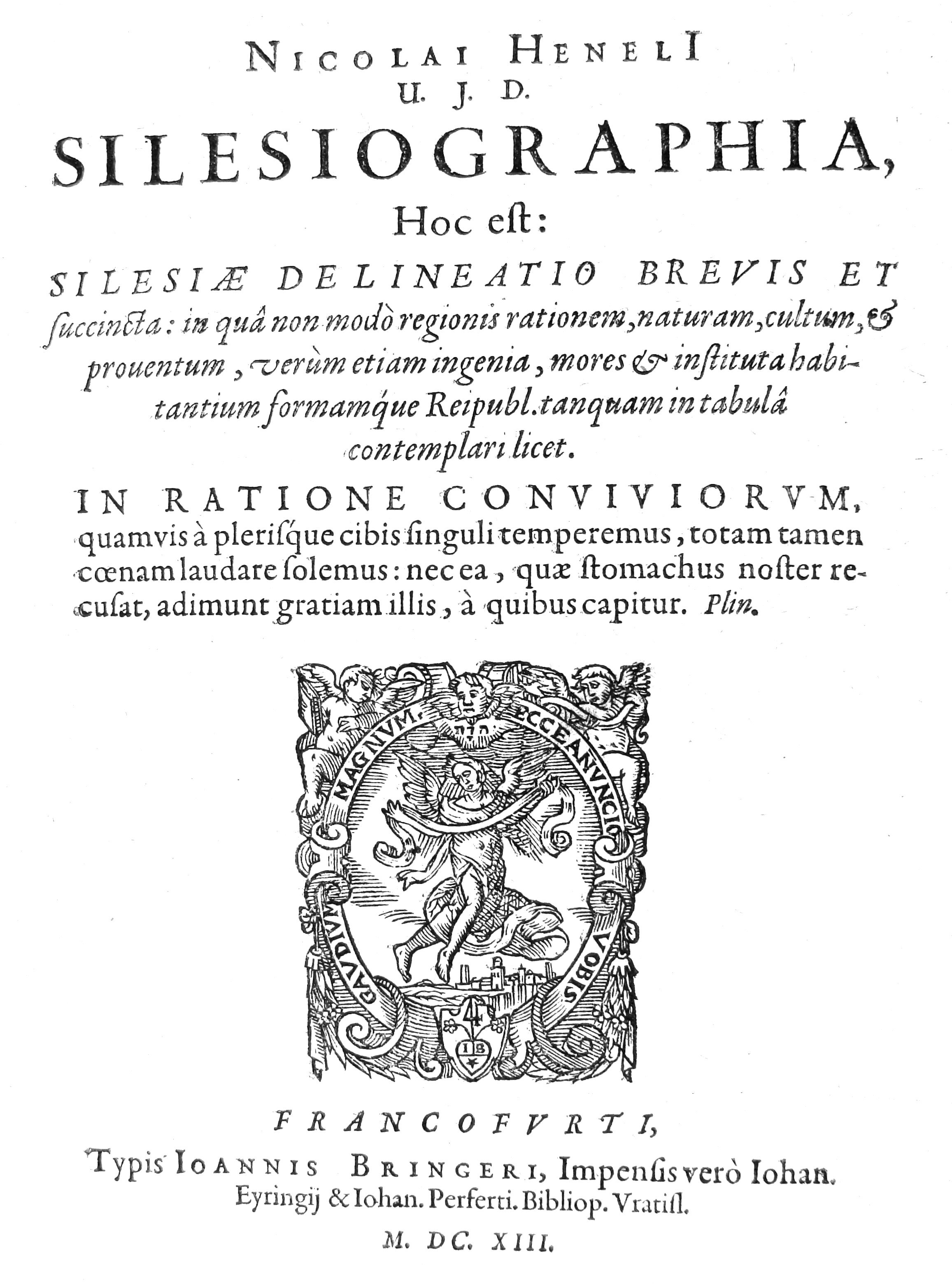 Strona tytułowa Silesiographia Nikołaja Henela